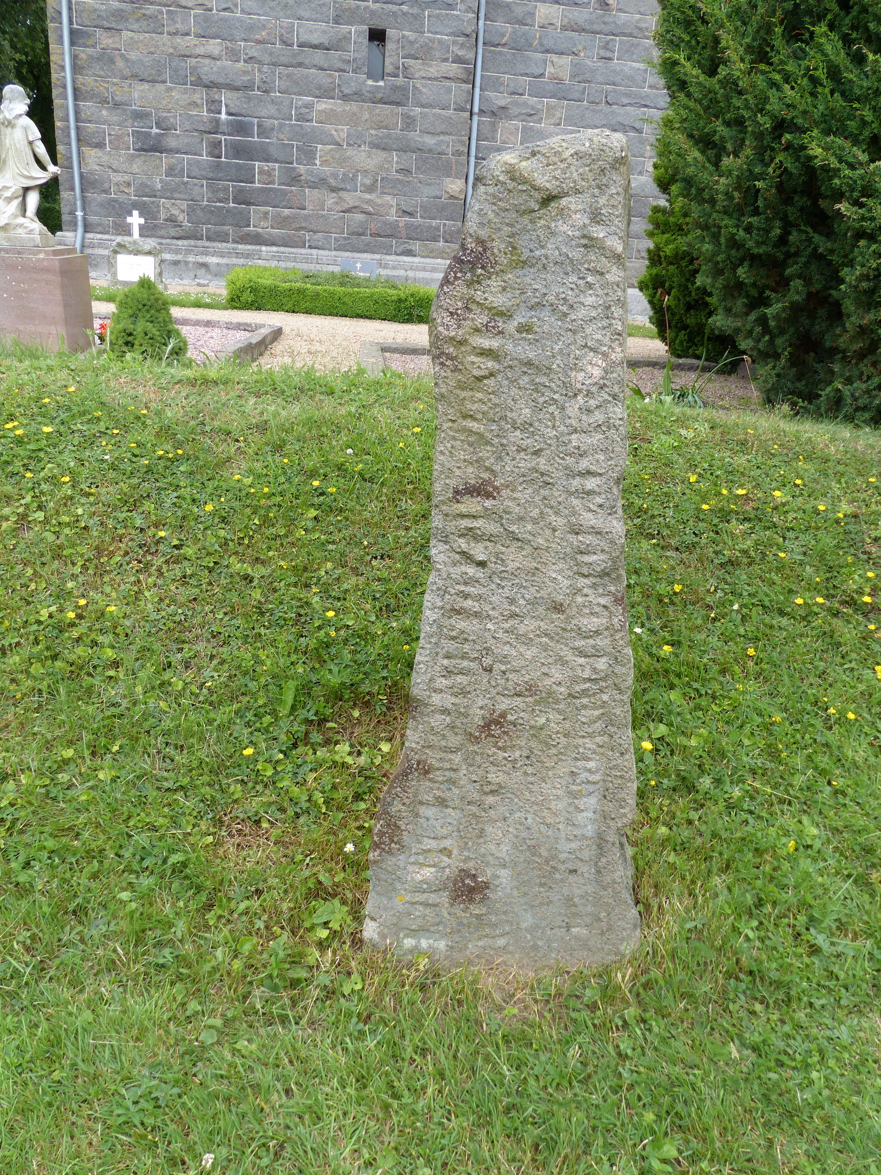 Bornholm, Oestermarie Kirkegaard, Runesten (3)